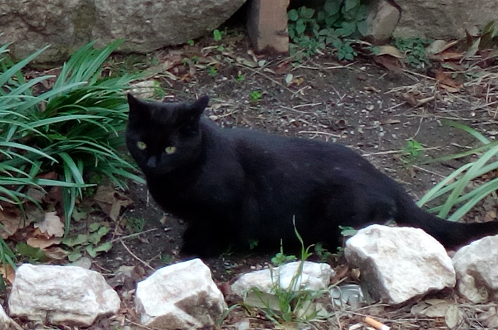 un gatto nero, animale simbolo del folklore di molte culture